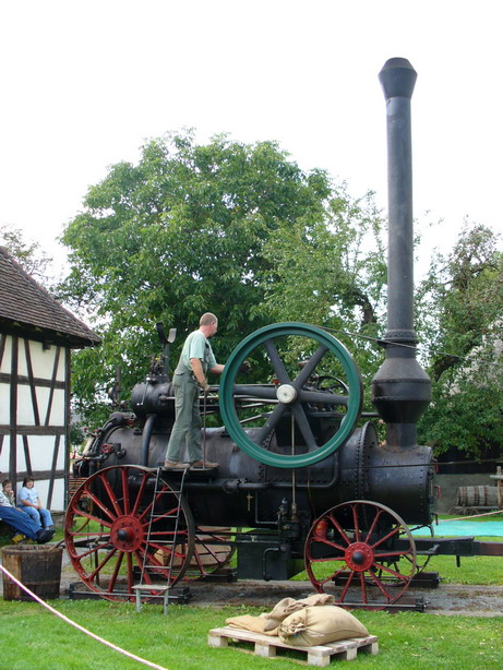 Ort: Bad Schussenried Landkreis Biberach Freilichtmuseum Kürnbach Lokomobil von 1912 der Fa. Assmann&Stockder GmbH Stuttgart-Cannstatt selbst fotografiert von user:Enslin am 24.9.2005